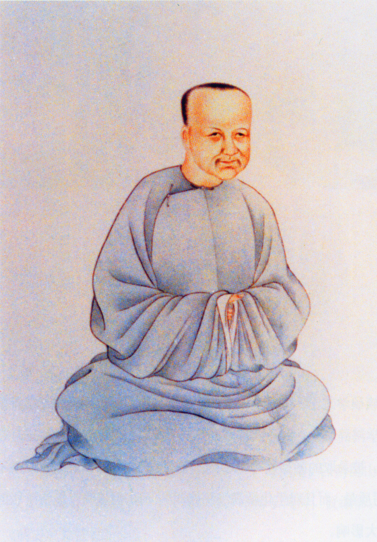 万斯同，清代学者。Wan Sitong